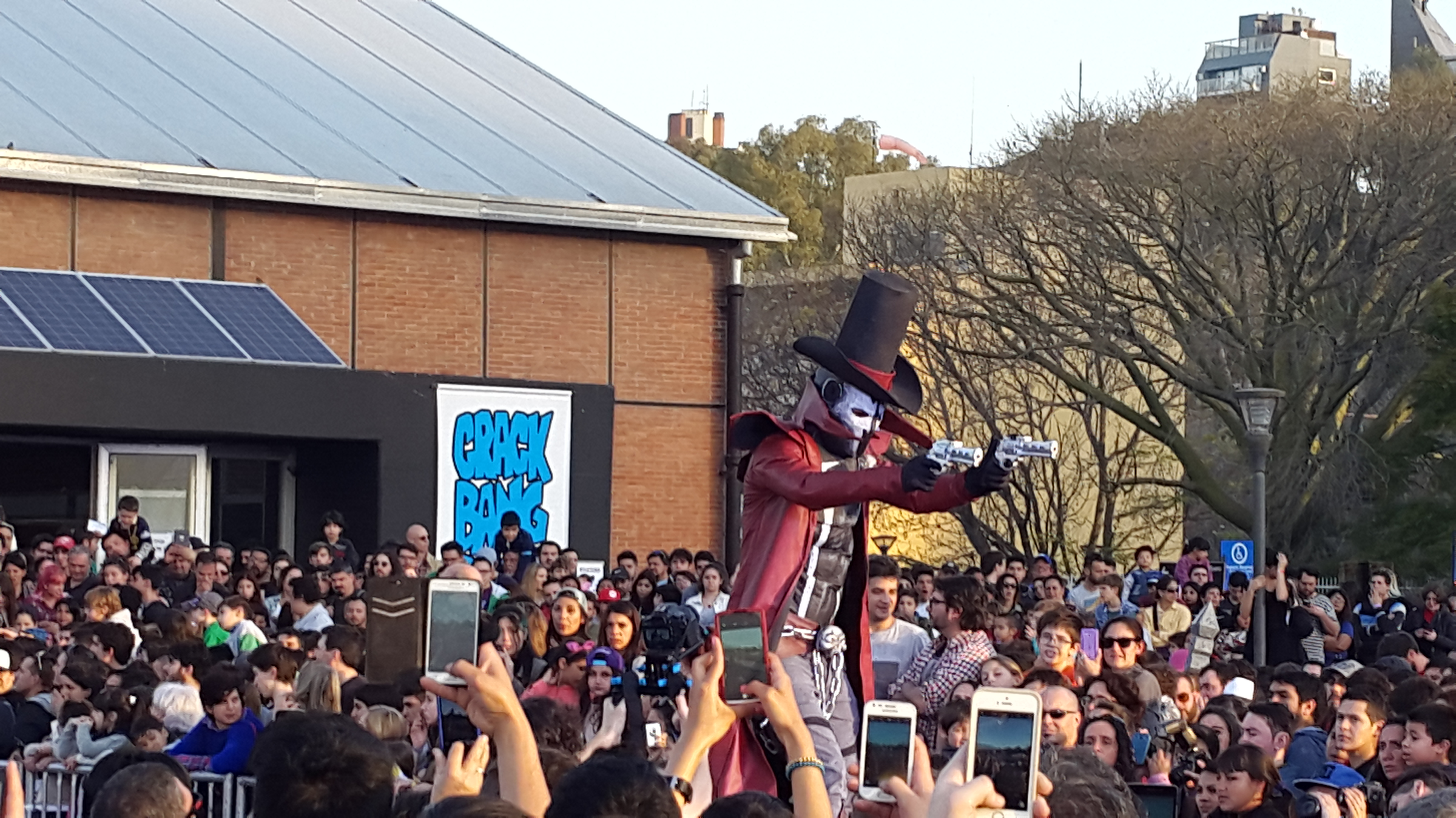 Desfile